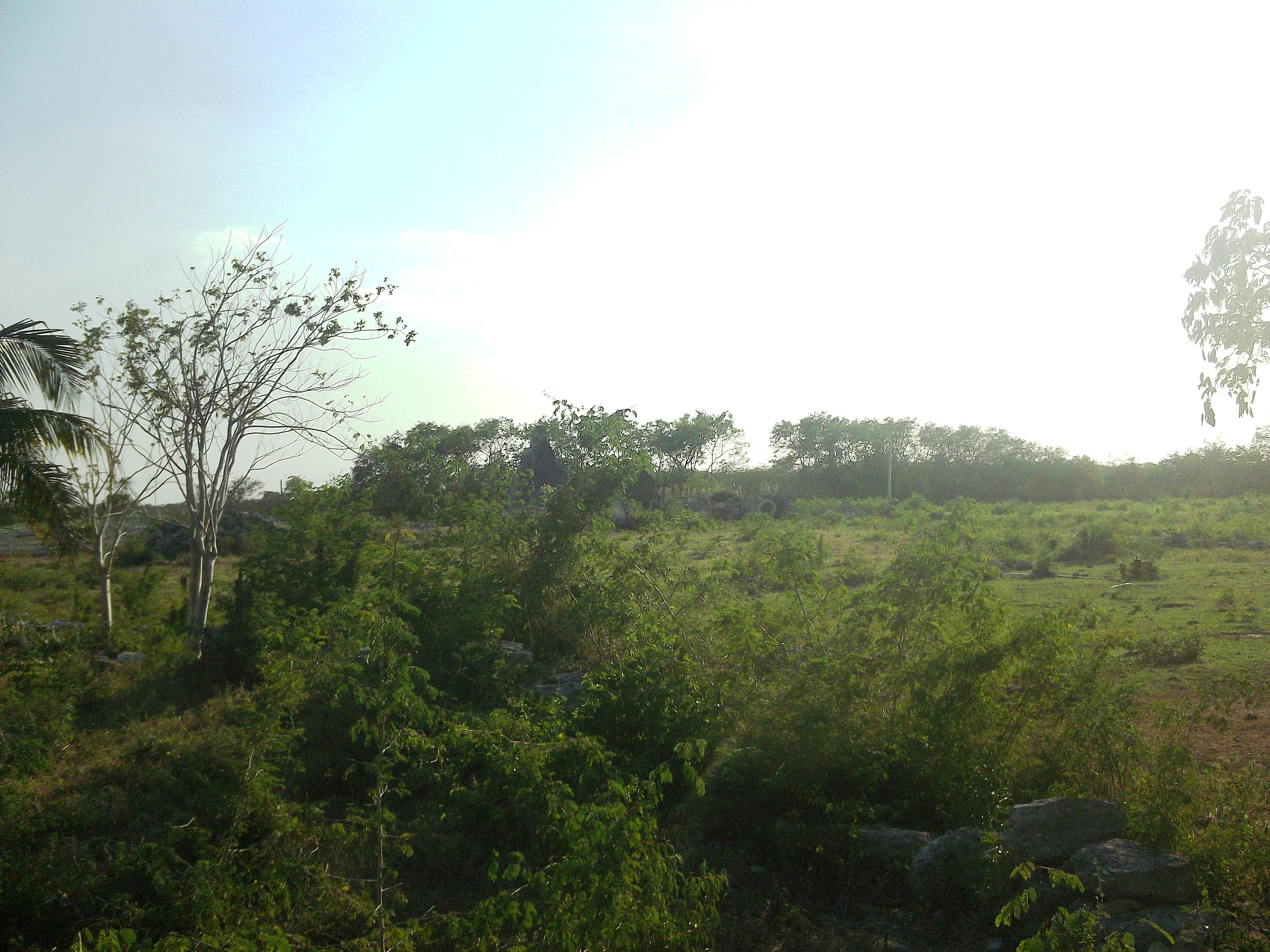 Hacienda Siniltún, Yucatán.